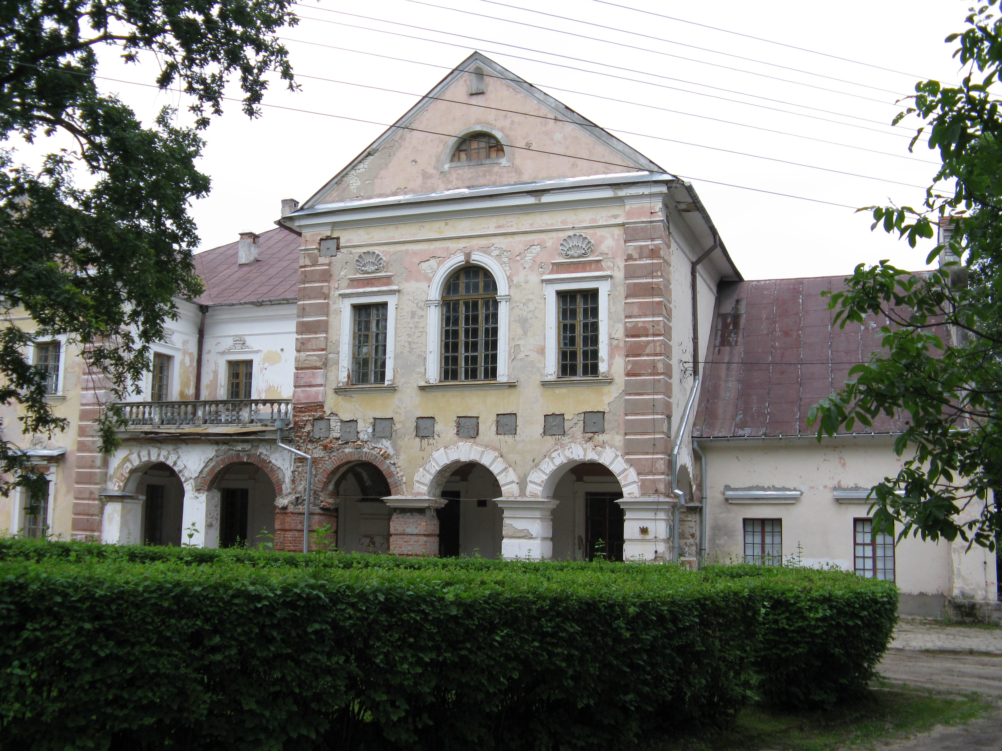 Pałac w Gardzienicach, XVI w.